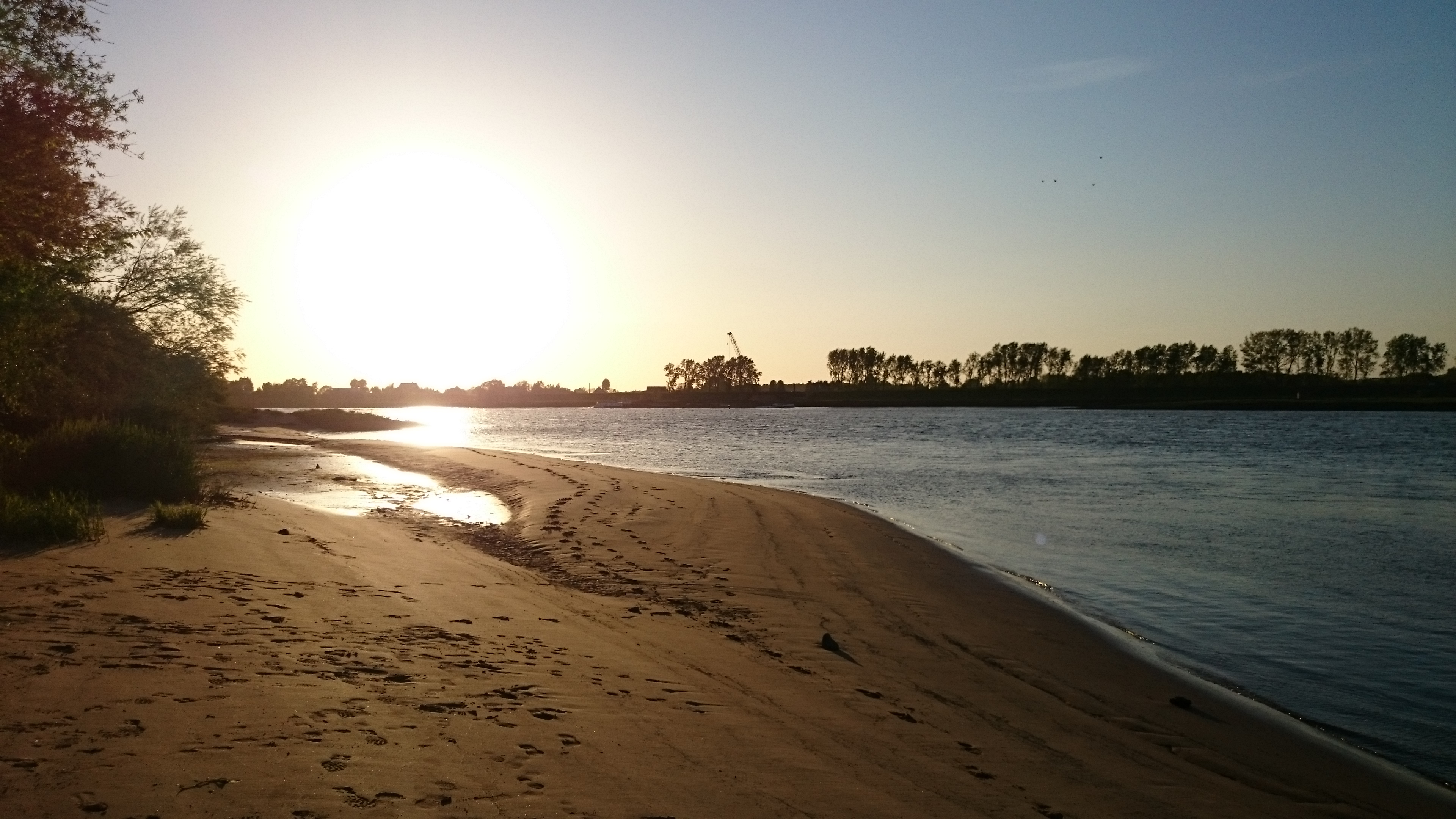 Hier sieht man den Stover Elbstrand bei Ebbe an einen wunderschönen Abend mit Sonnenuntergang! Im FFH-Gebiet "Elbe zwischen Geestharcht und Hamburg", das andere Ufer im Hintergrund in einem anderen FFH-Gebiet